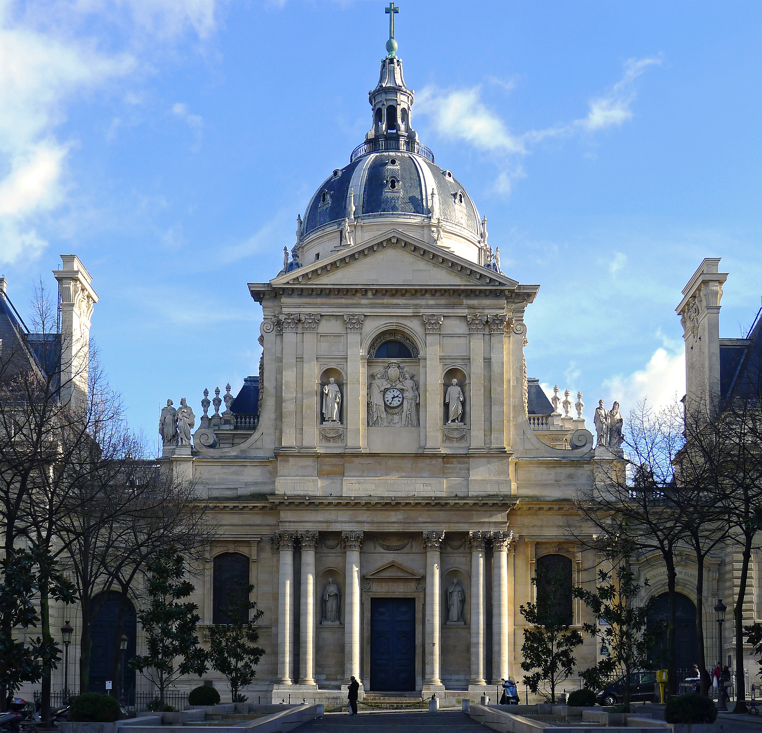 Chapelle Sainte-Ursule de la Sorbonne - Paris V